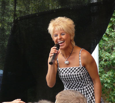 Linda Feller auf einem Konzert in Dresden